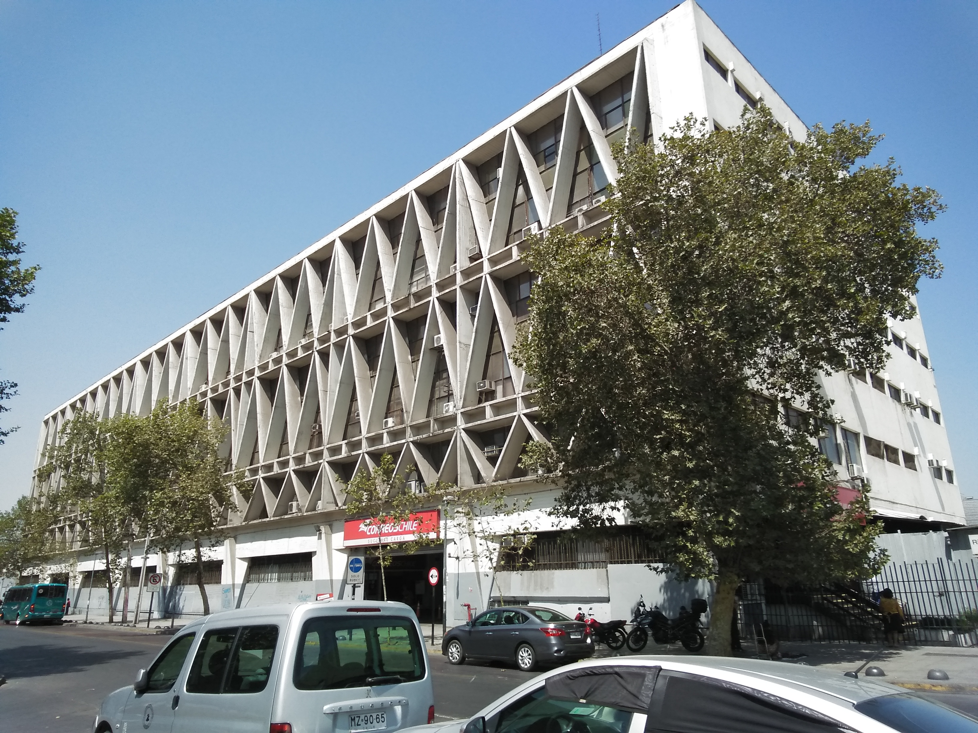 Sucursal de carga de Correos Chile, ubicada en calle Exposición 221, Estación Central, Santiago de Chile. Construida entre 1971 y 1975, originalmente era la Central Clasificadora de Correspondencia hasta la construcción de una nueva planta en Quilicura.